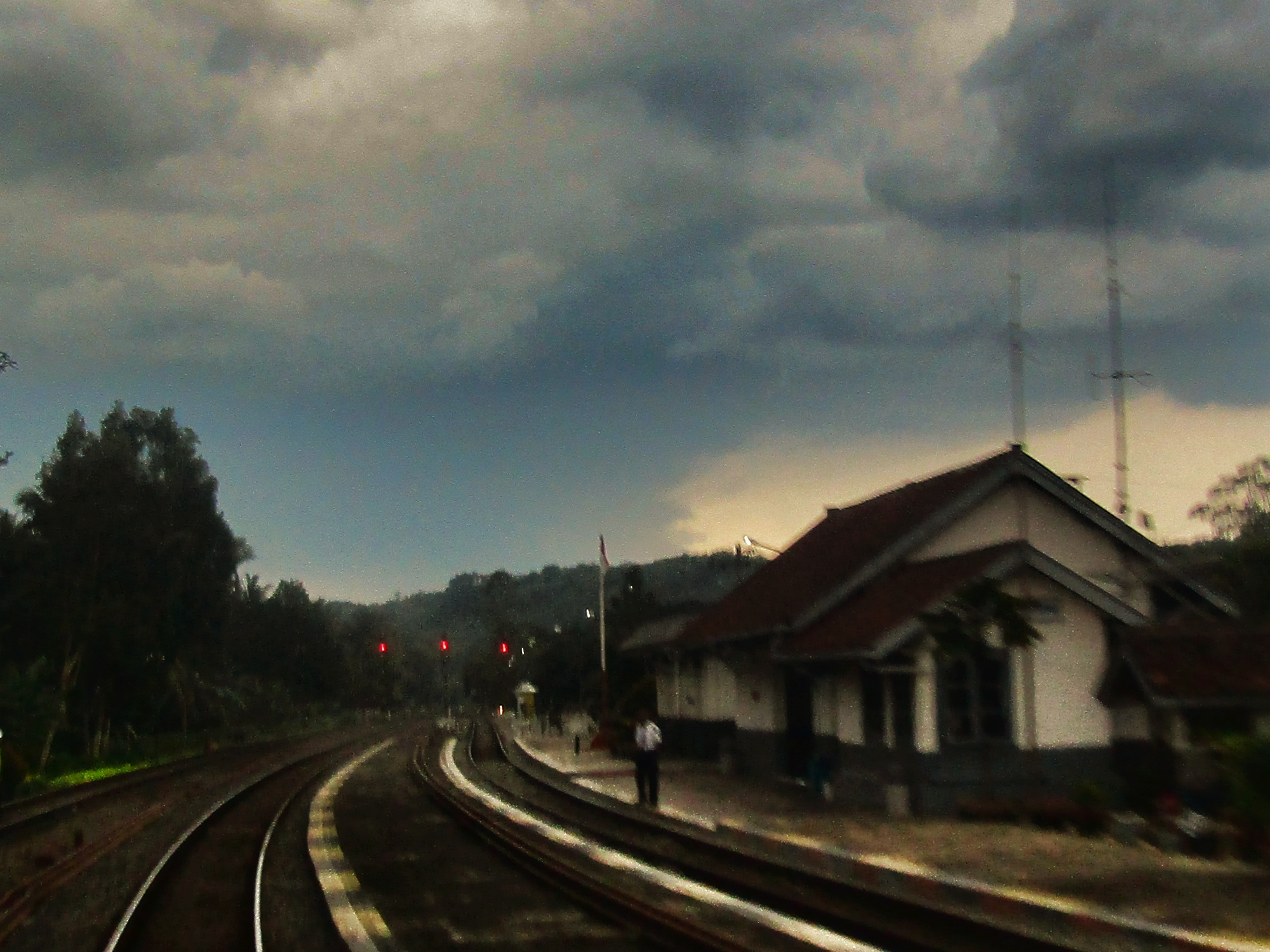 Bangunan Stasiun Karangpucung 2020